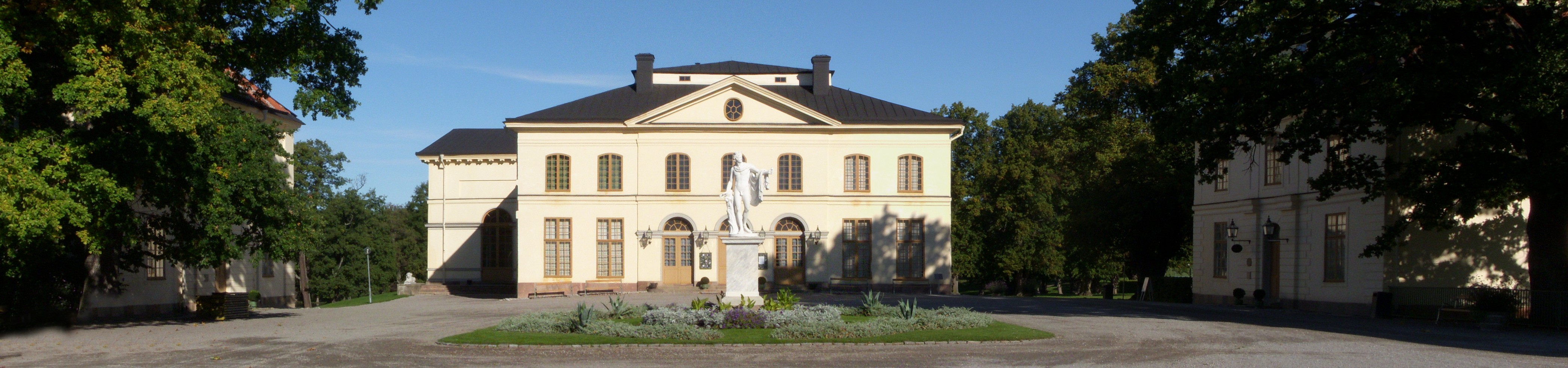 Drottningholms slottsteater och Teaterplanen